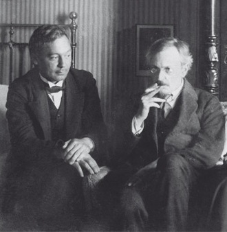 Математики Яков Викторович Успенский и Борис Николаевич Делоне. 1924 год